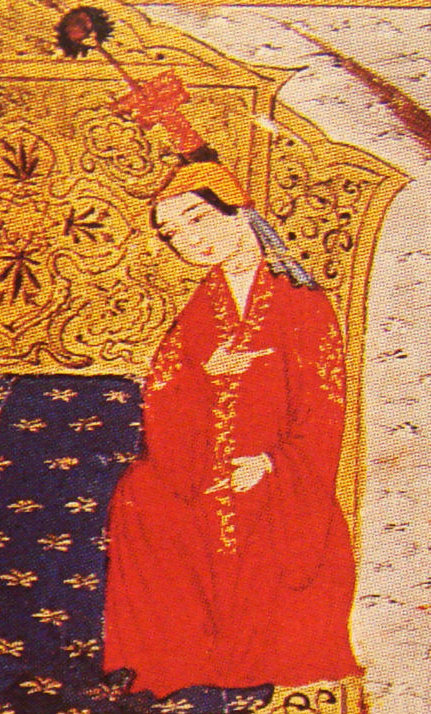 Sorkhagtani bekhi d'après Rashid al-Din dans Djami al-Tawarikh.